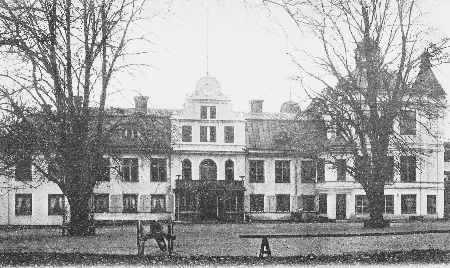 Stora Frösunda huvudbyggnad